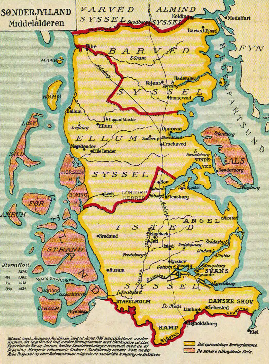 Gustav Rosendal - Sønderjylland i middelalderen, fra 1913